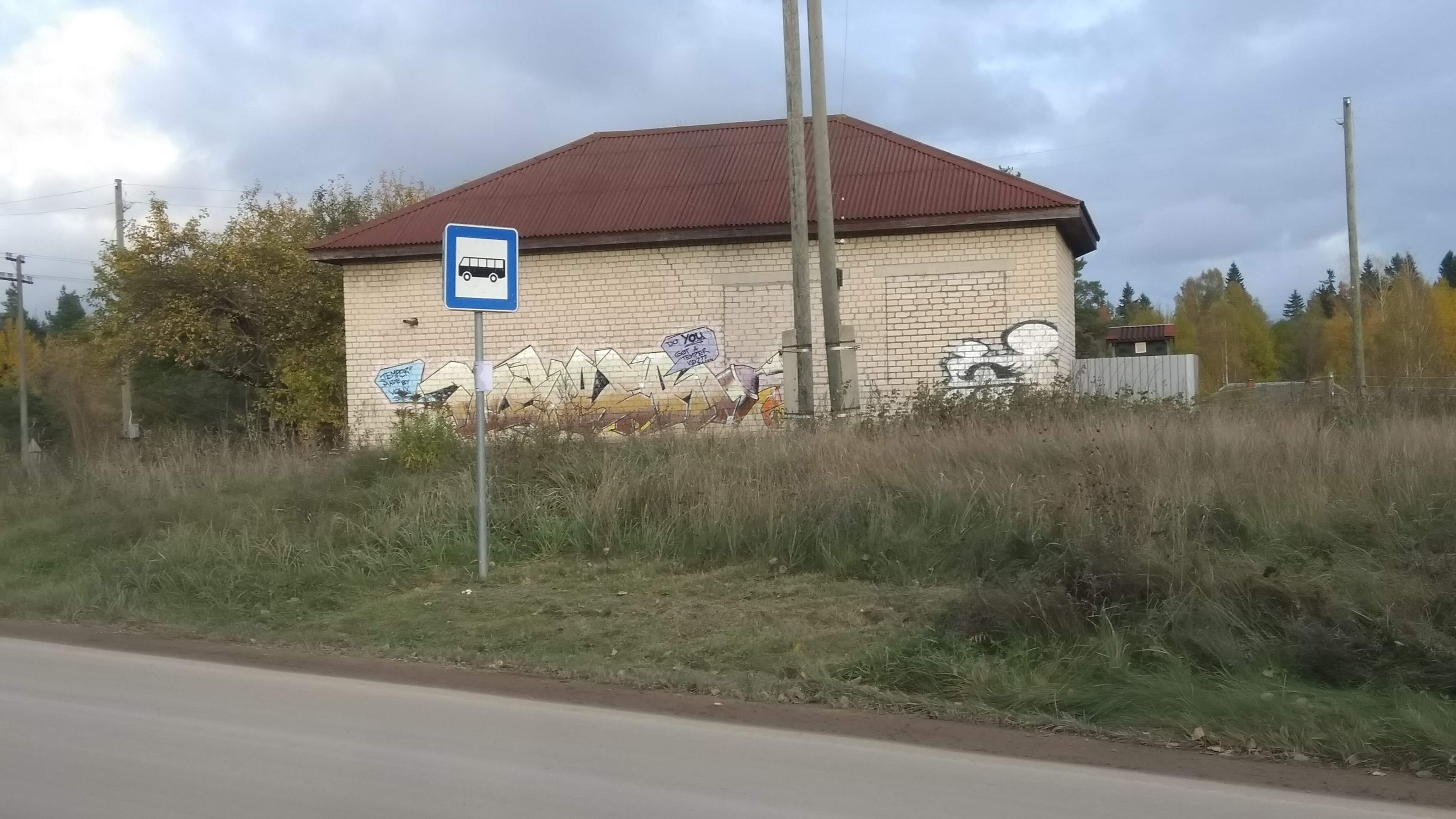 9. autobusu maršruta pietura Viļakas ielā un Kleperovas ceļa posteņa ēka Stučevā.